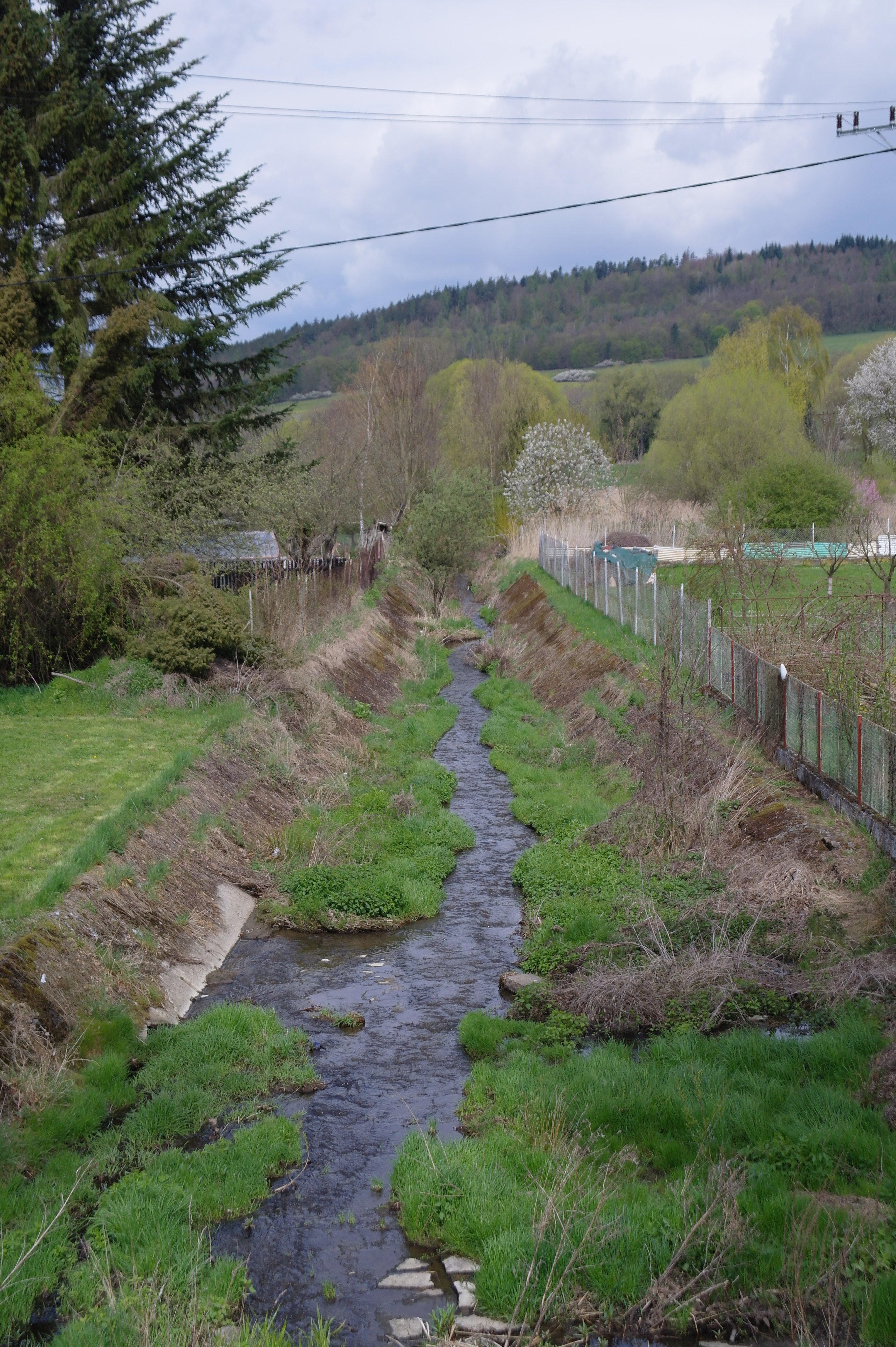 Horšice